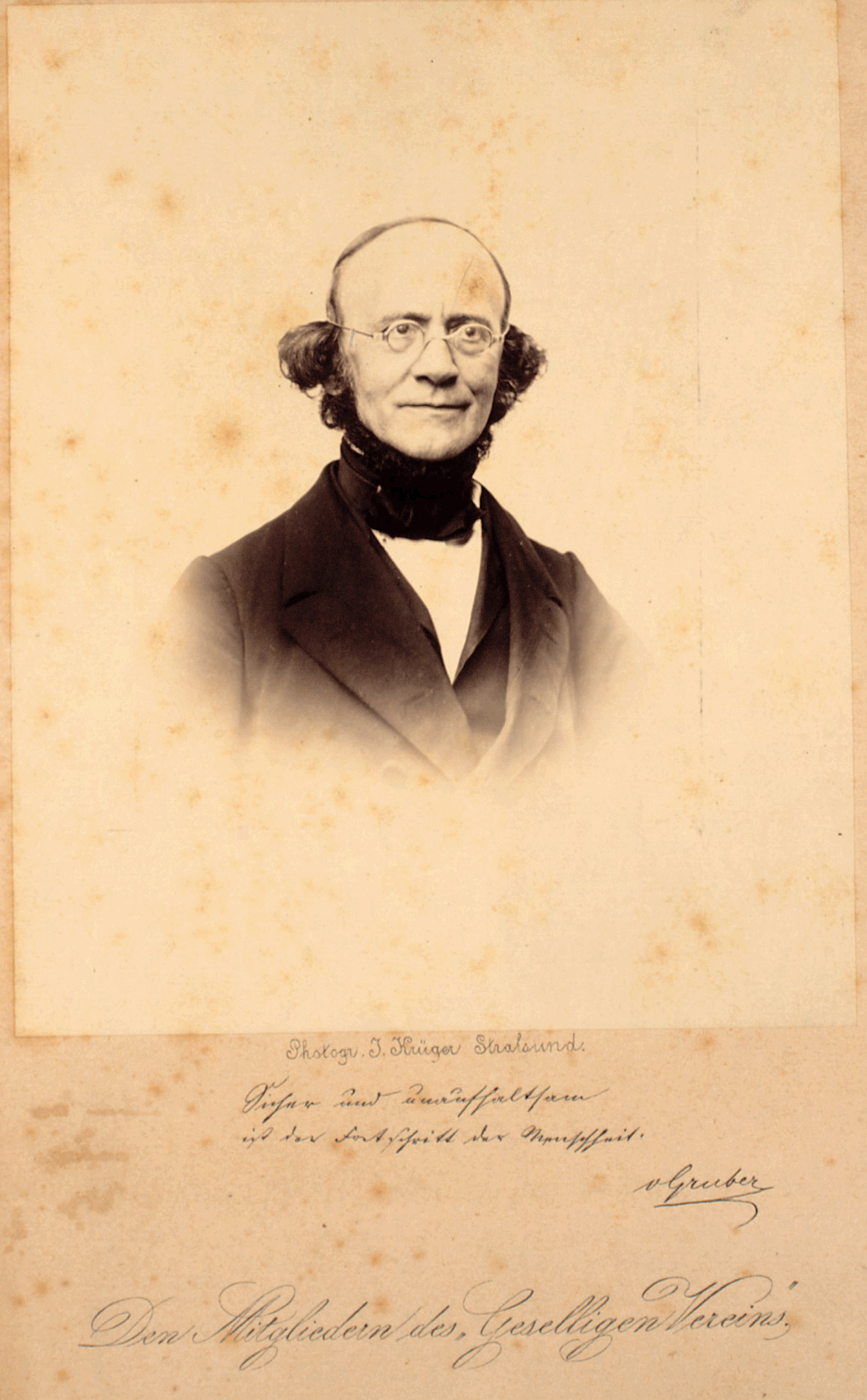 Johannes von Gruber 1860 : Den Mitgliedern des Geselligen Vereins : Text: "Sicher und unaufhaltsam ist der Fortschritt der Menschheit"